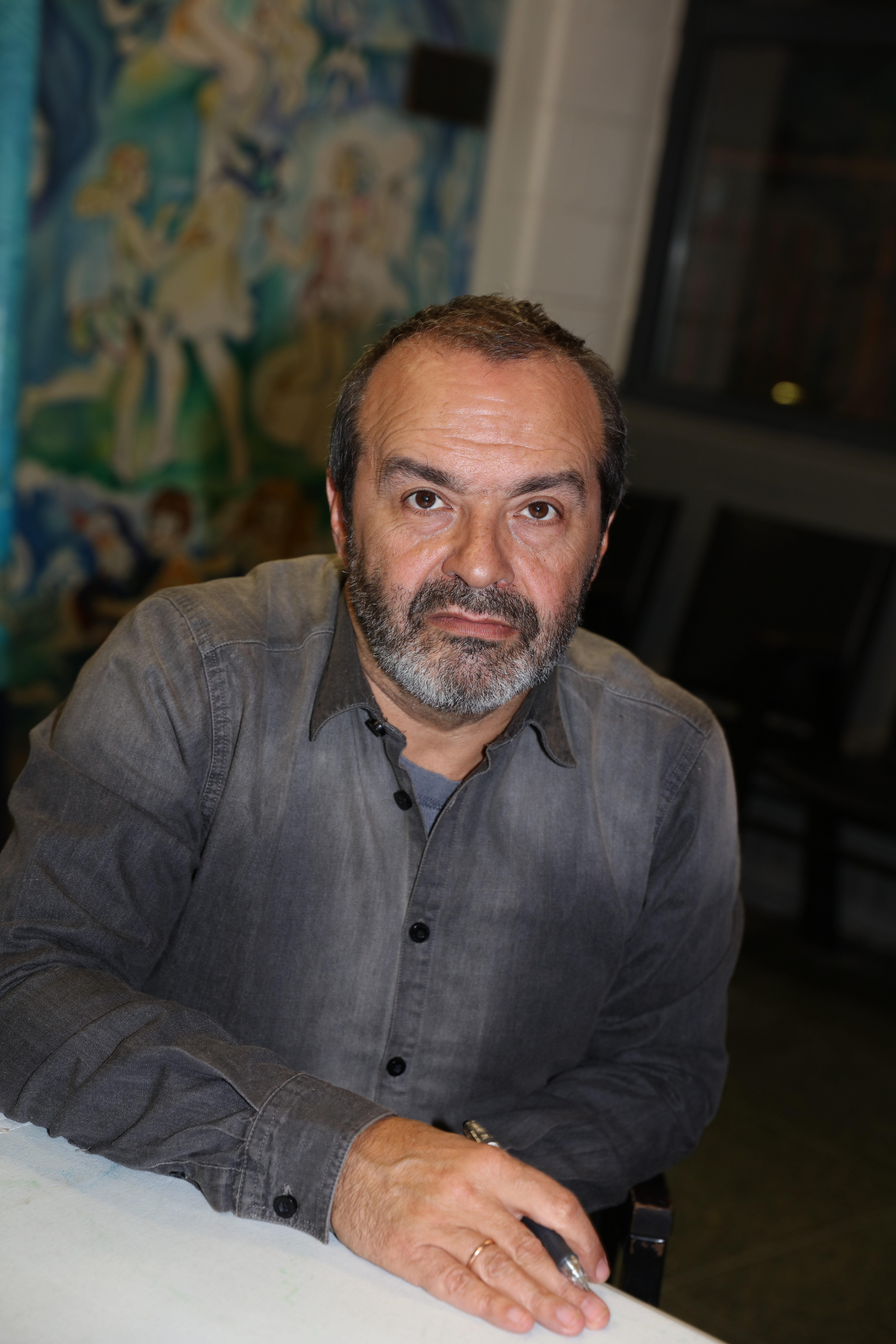 Виктор Анатольевич Шендерович